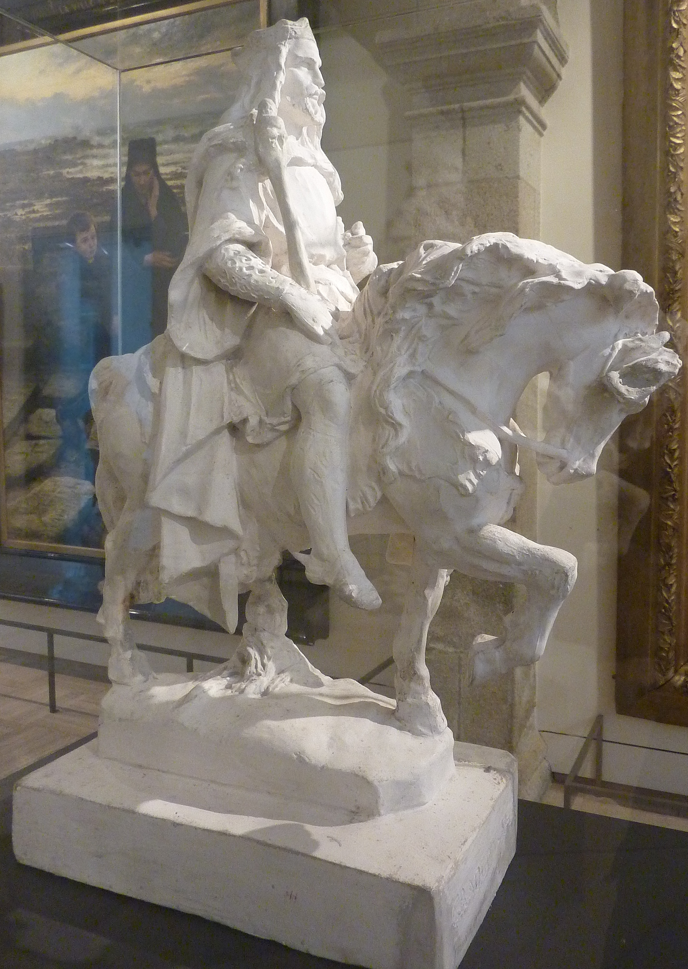 Amédée Ménard : Le roi Gradlon (vers 1850, maquette en plâtre pour une sculpture de granite, musée des beaux-arts de Quimper). La statue définitive, commandée par l'architecte finistérien René Bigot, fut placée entre les tours de la cathédrale Saint-Corentin de Quimper en 1858 pour remplacer une statue équestre du même roi Gradlon qui était déjà à cet endroit et qui avait été détruite en 1793.